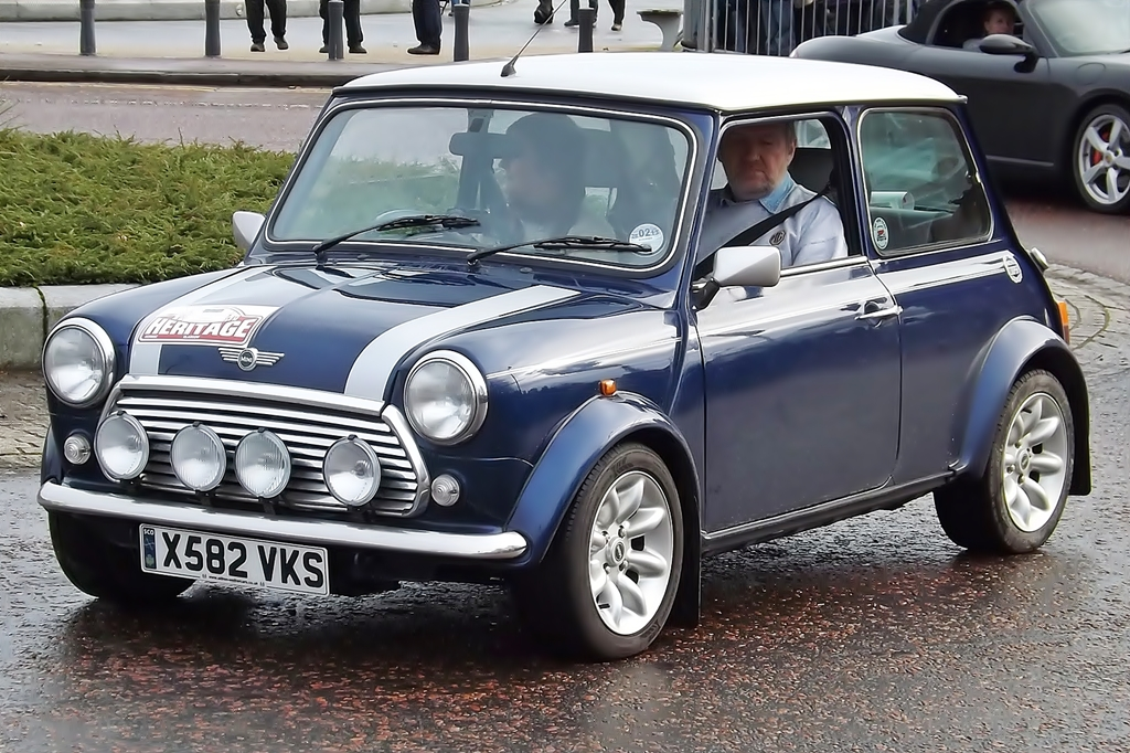 Mini